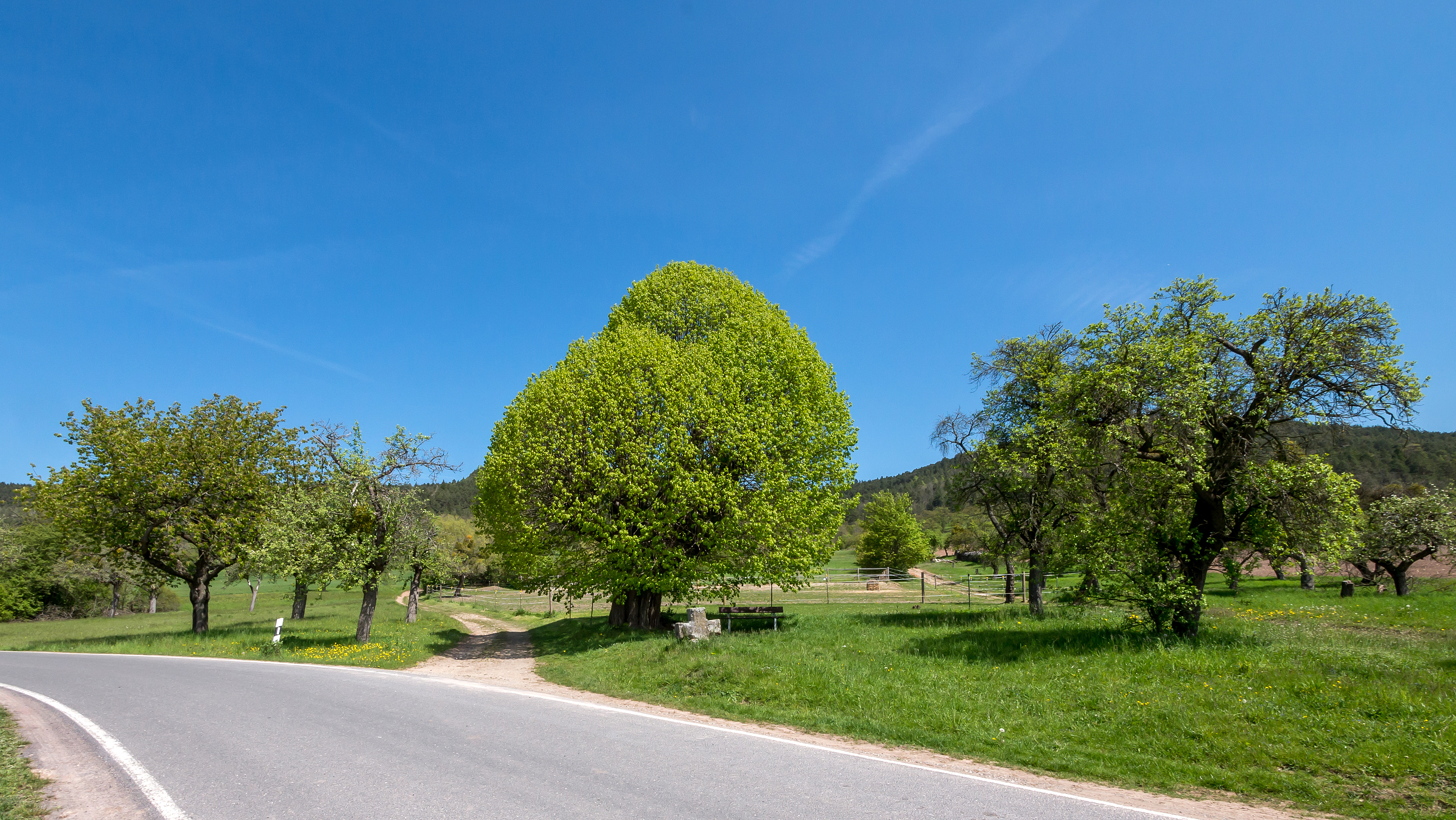 Spaal-Linde Listen Nr. 14 Engerda I